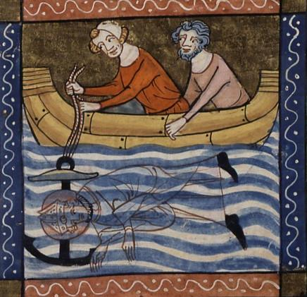 Martyre de saint Clément dans la "Legenda aurea" de saint Jacques de Voragine. Richard de Montbaston. XIVe